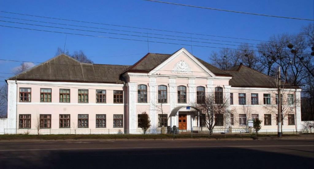 Вигляд на ліцей при ЖДТУ